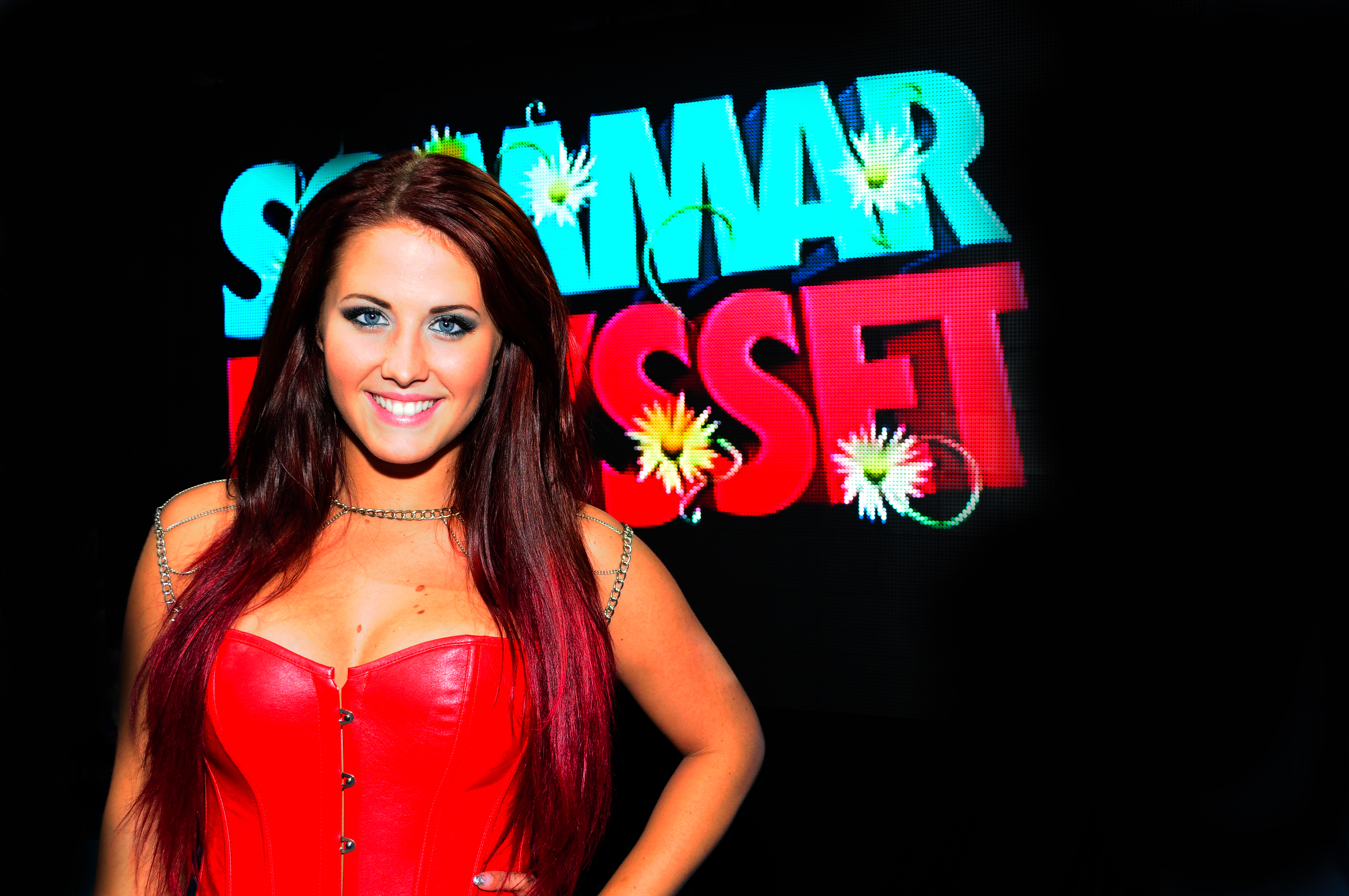 Molly Sandén Sommarkrysset veteran, nu 2012